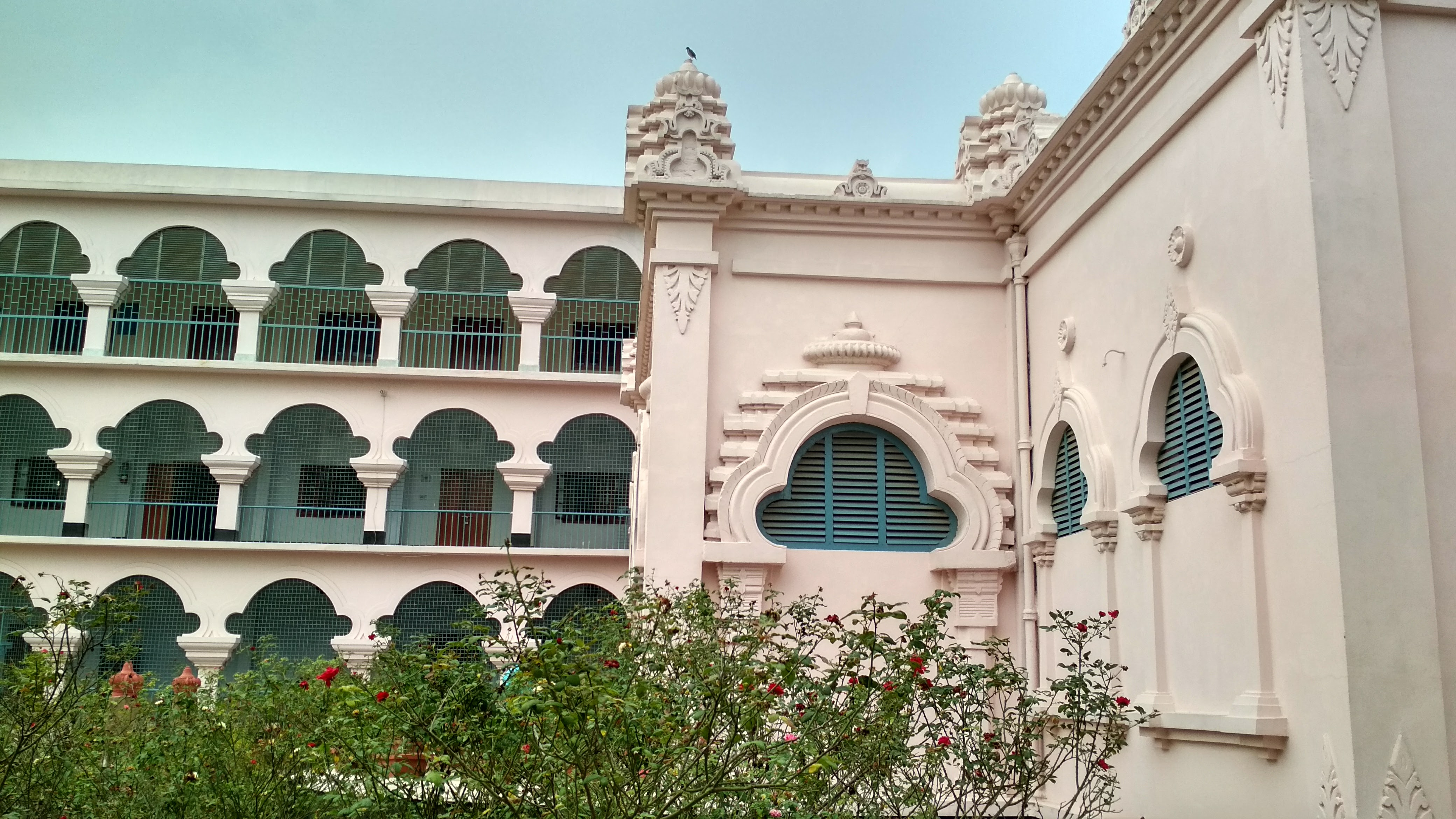 বরেন্দ্র গবেষণা জাদুঘর